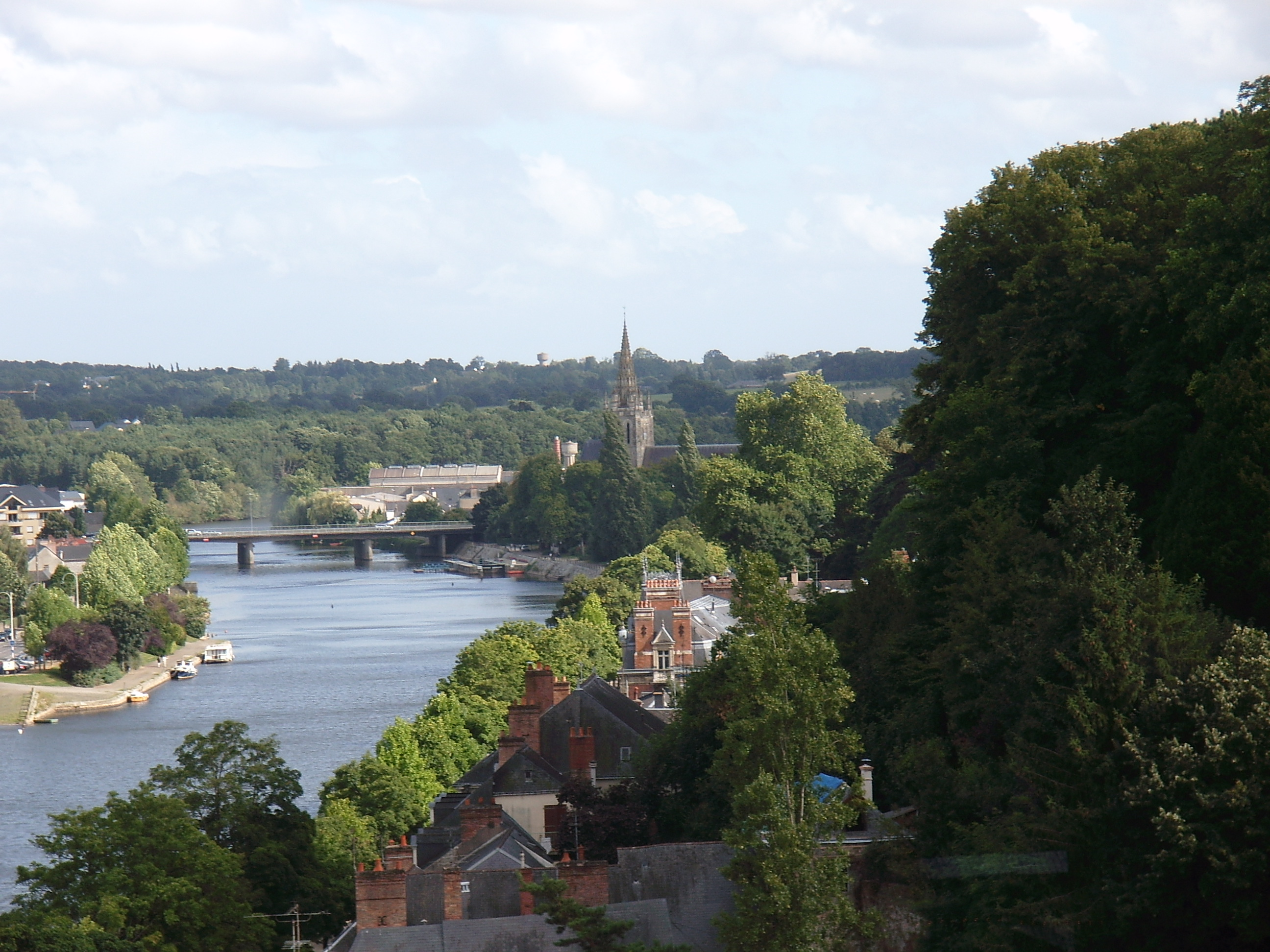 Vue de la ville de Laval et en particulier le quartier d'Avesnière prise du haut du donjon du château.